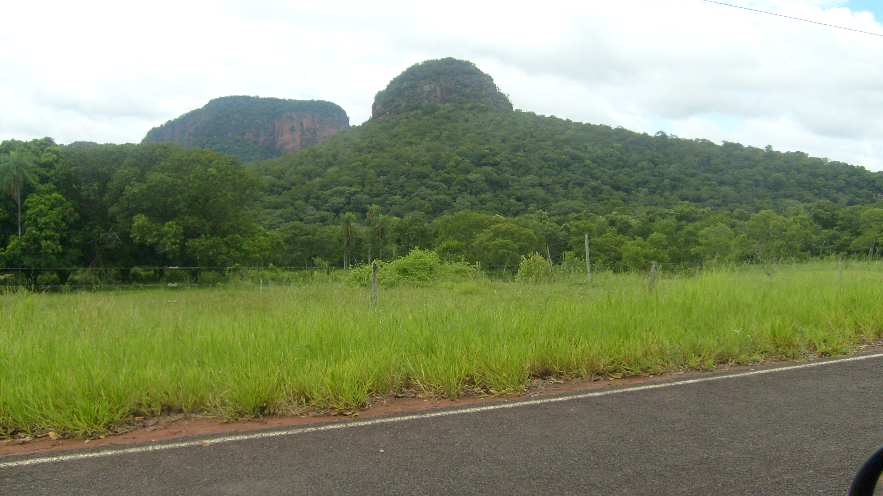 Este é o Morro do Chapéu, Serra de Maracaju, no Distrito de Camisão, Aquidauana-MS (Portal do Pantanal).